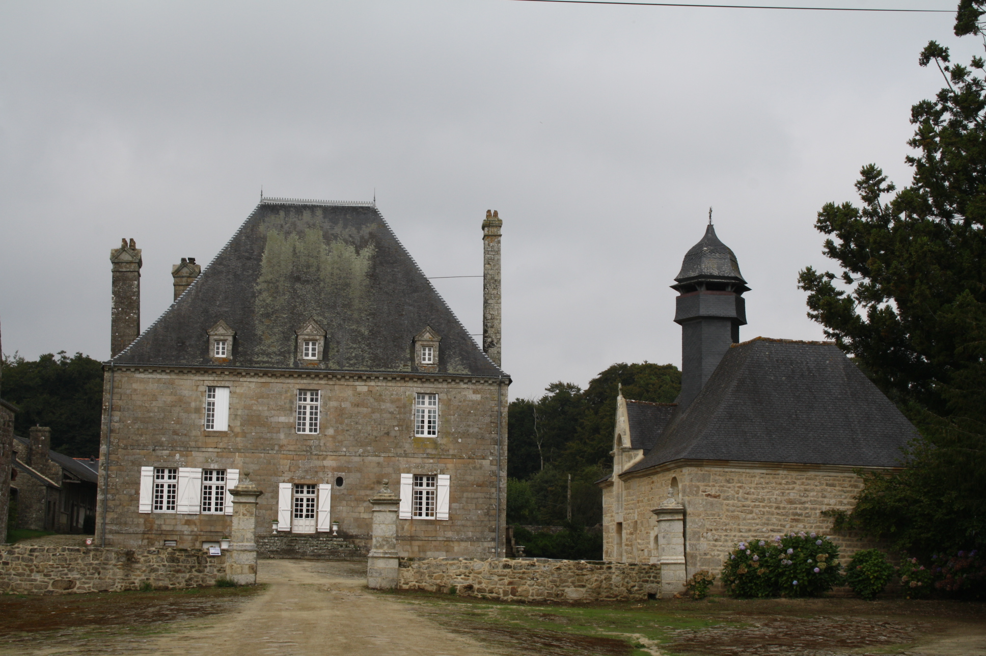 le château - vue de face en arrivant aux grilles .